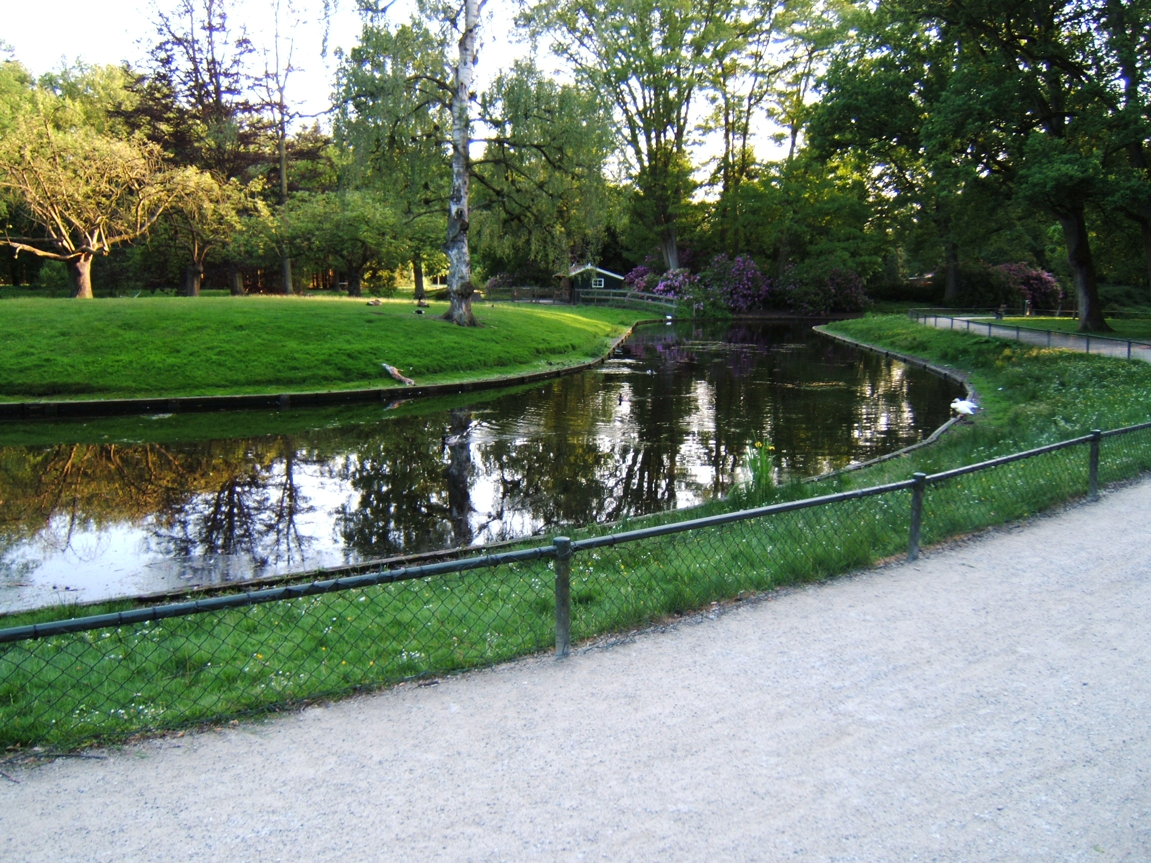 Nieuwe vijver in Asserbos. Het stukje voorbij het water is een eiland. zelf gemaakt